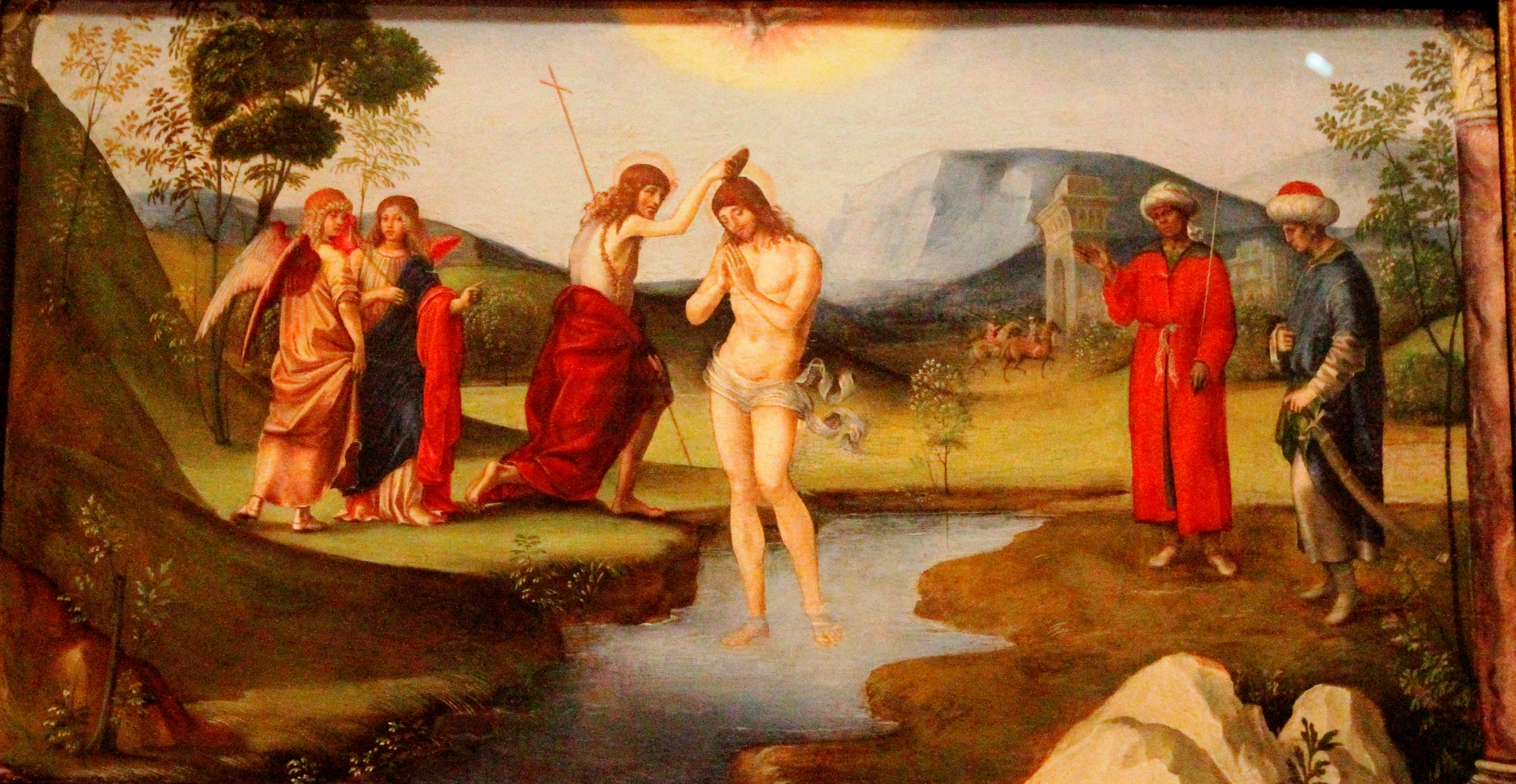 Museu Calouste Gulbenkian